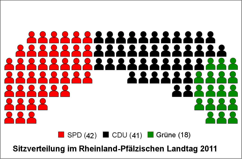 Sitzverteilung Landtag Rheinland-Pfalz 2011